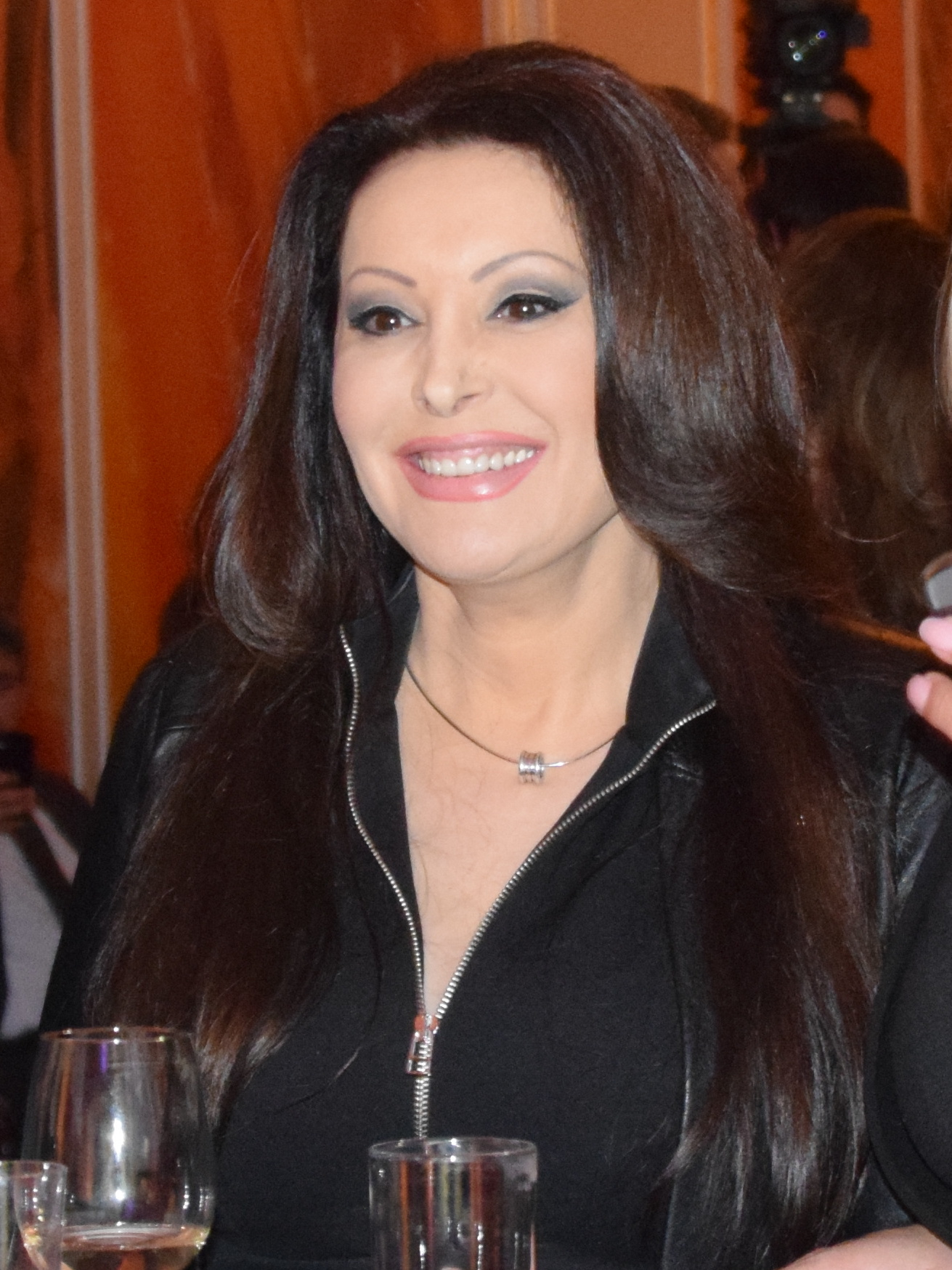 Dragana Mirković in der Hofburg. Wien, 29.01.2015